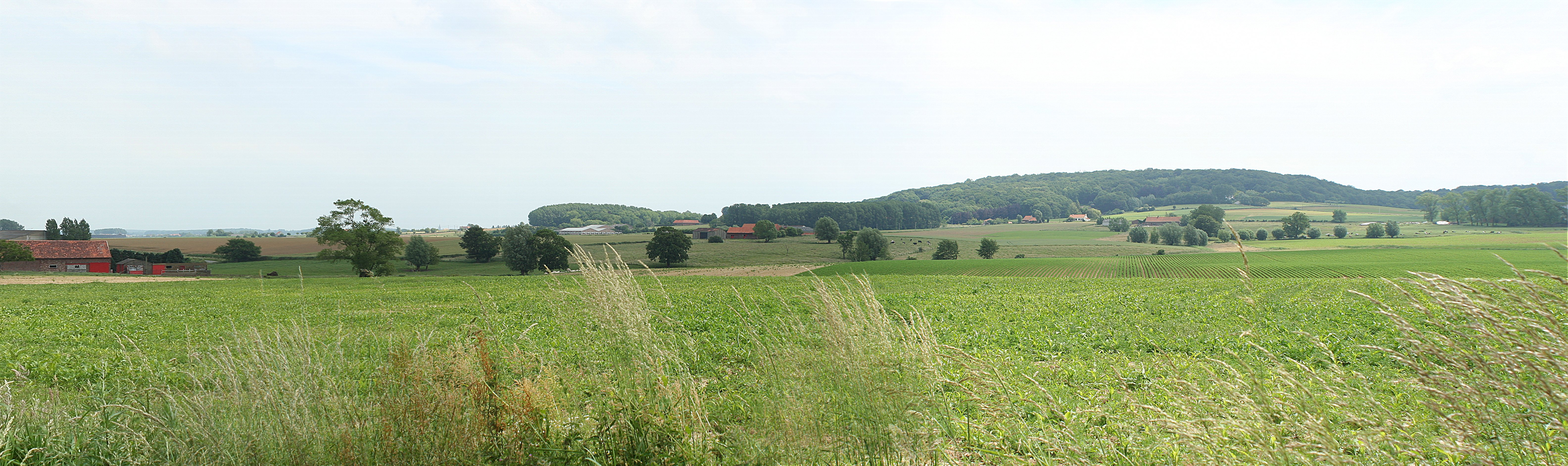 Panorama du Mont Kemmel, vu du versant nord. Photographie : Jean Van Campenhout, 19/06/2006.